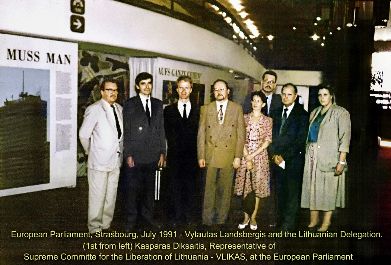 Nuotr. aut. Kasparas Dikšaitis